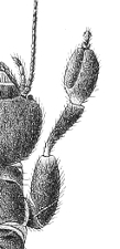 Embia major, Embioptera - adult male, male nymph and adult female